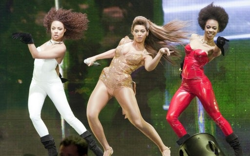 Beyonce durante el I am... Tour en Vancouver Canada